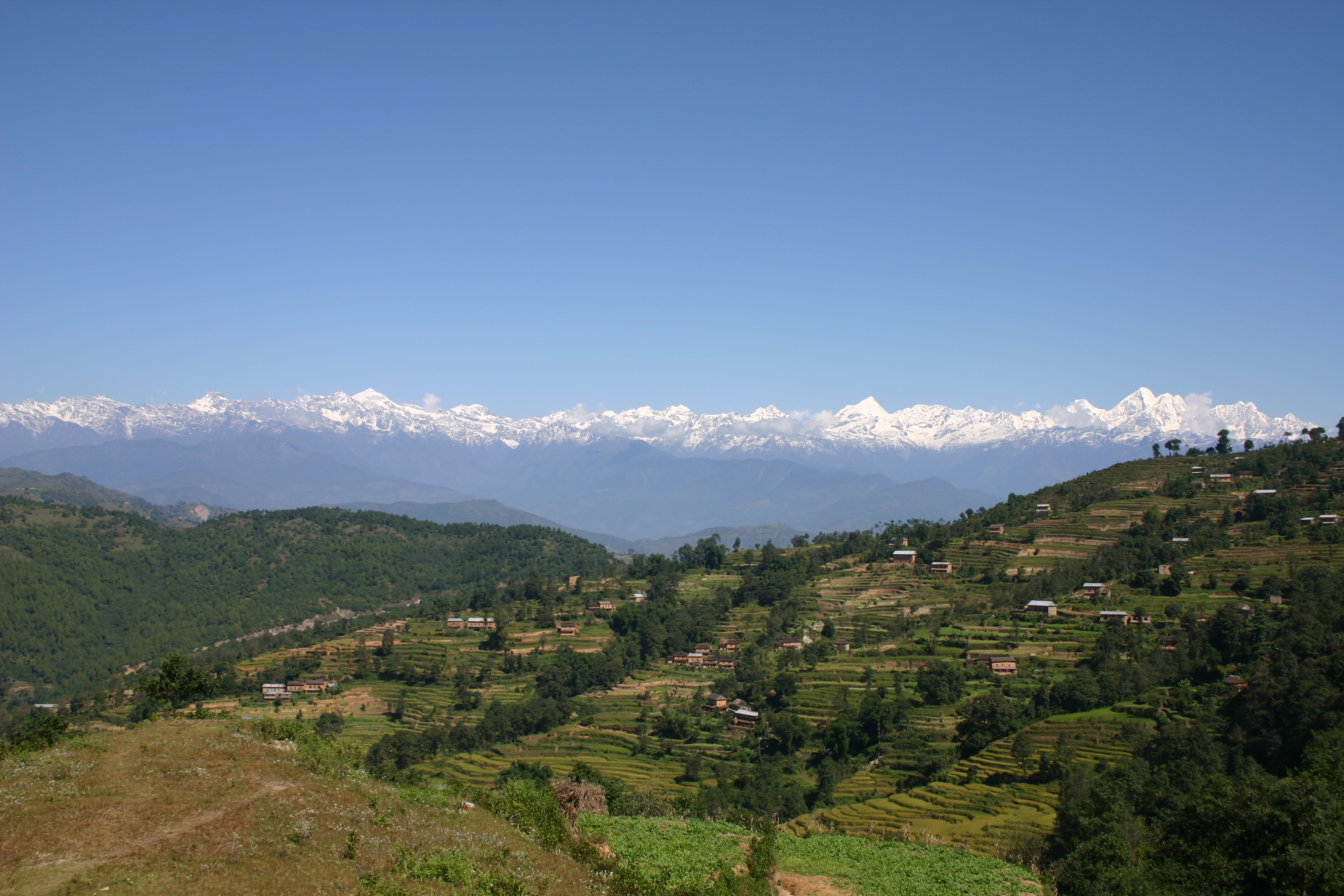 Kathmandu valley near Nagarkot